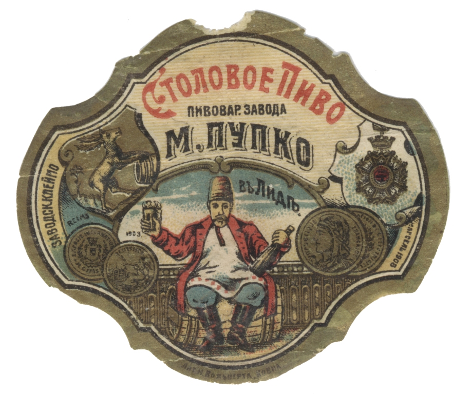 Этыкетка піваварнага завода М.Пупко ў Лідзе.